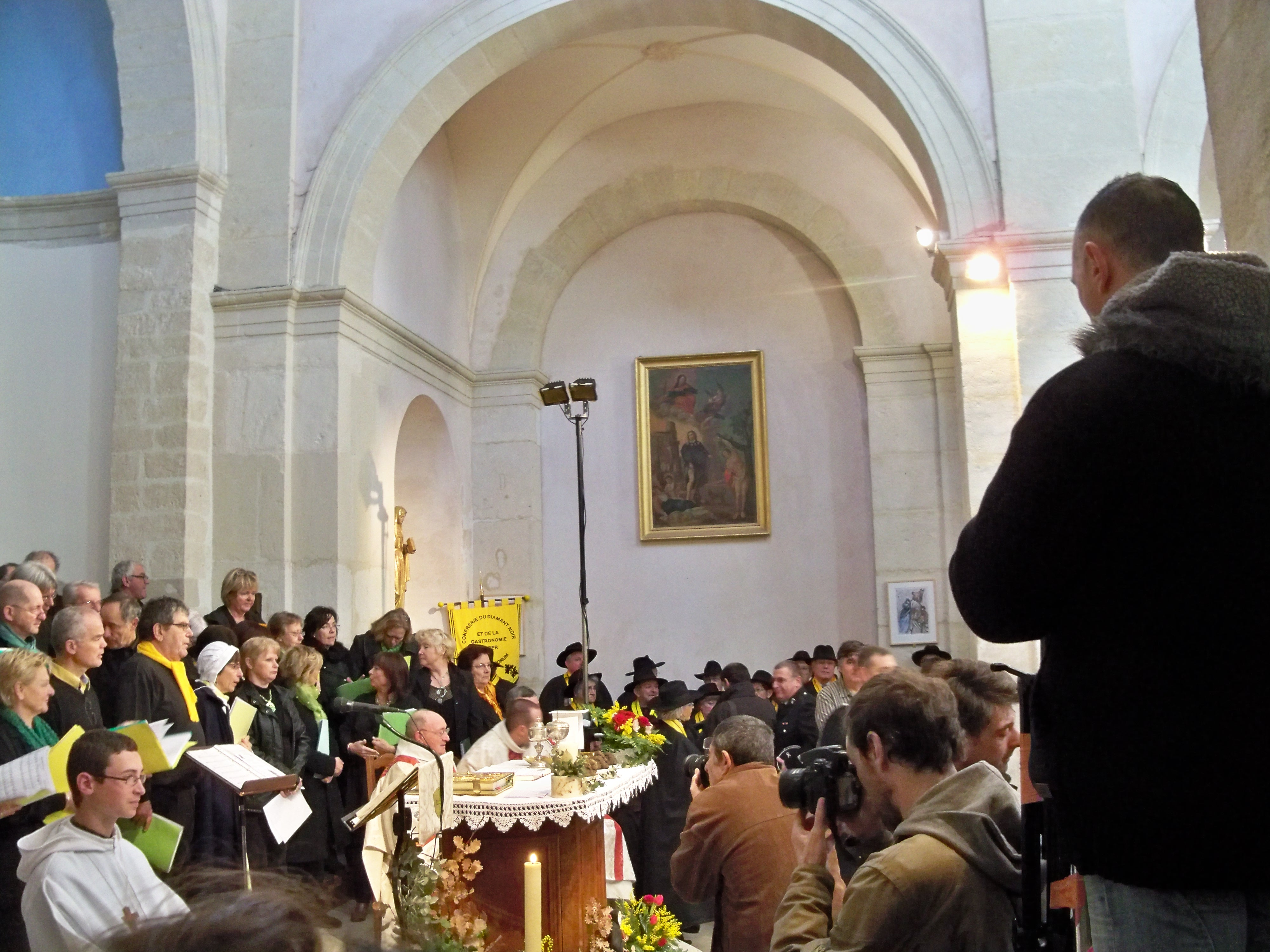 Messe aux truffes de Richerenches, Vaucluse, France